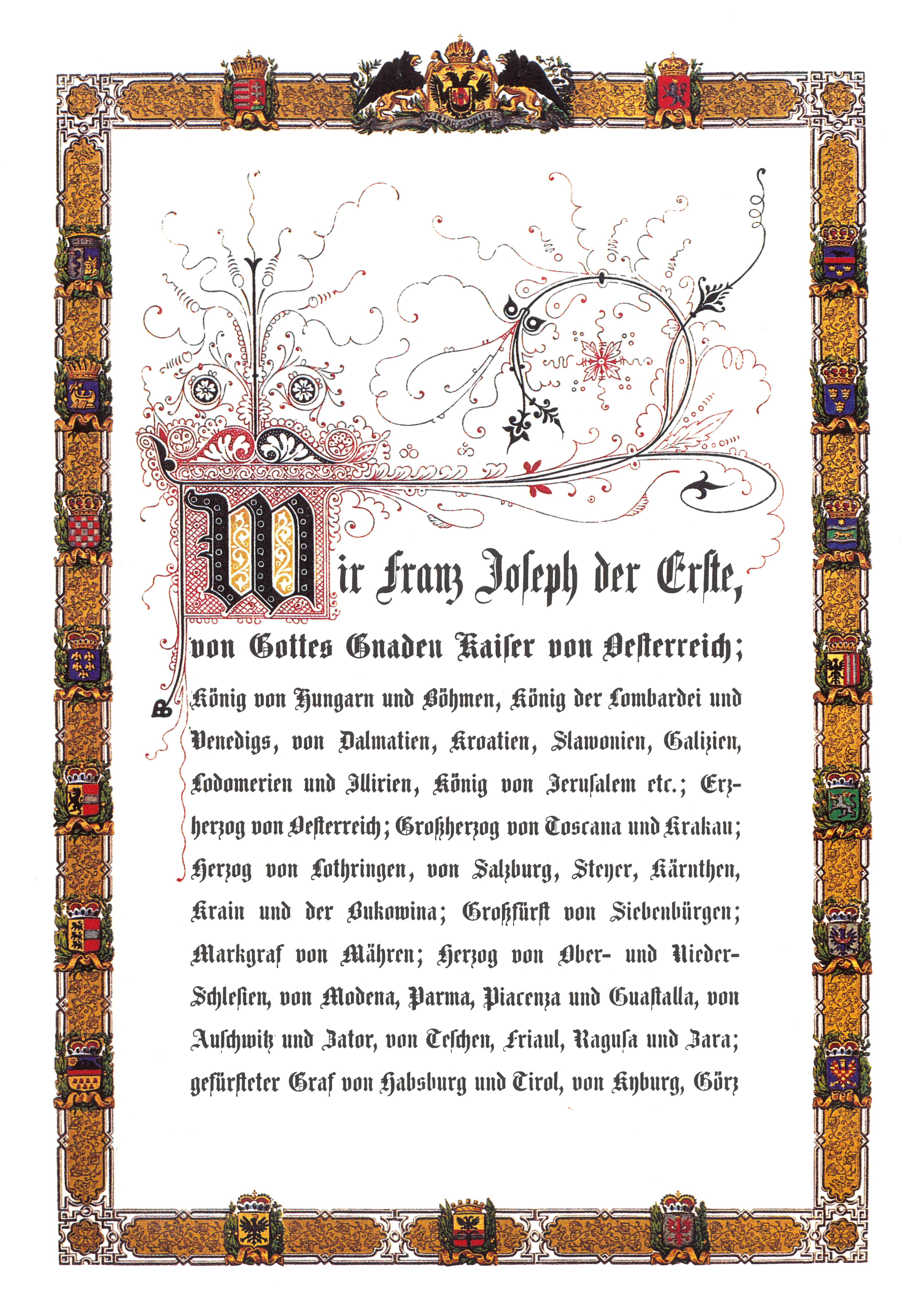 Februarpatent, die am 26. 02. 1861 durch Kaiser Franz Joseph erlassene Verfassung für den gesamten österreichischen Kaiserstaat. Mitte oben das Reichswappen von Österreich – im Urzeigersinn: Böhmen, Galizien, Dalmatien, Slavonien, Oberösterreich, Steiermark, Krain, Mähren, Tirol, Schlesien, Siebenbürgen, Kärnten, Salzburg, Niederösterreich, Kroatien, Illyrien und Lombardei-Venetien. Das Vorarlbergwappen fehlt; es wurde 1864 vom Kaiser verliehen. [1]